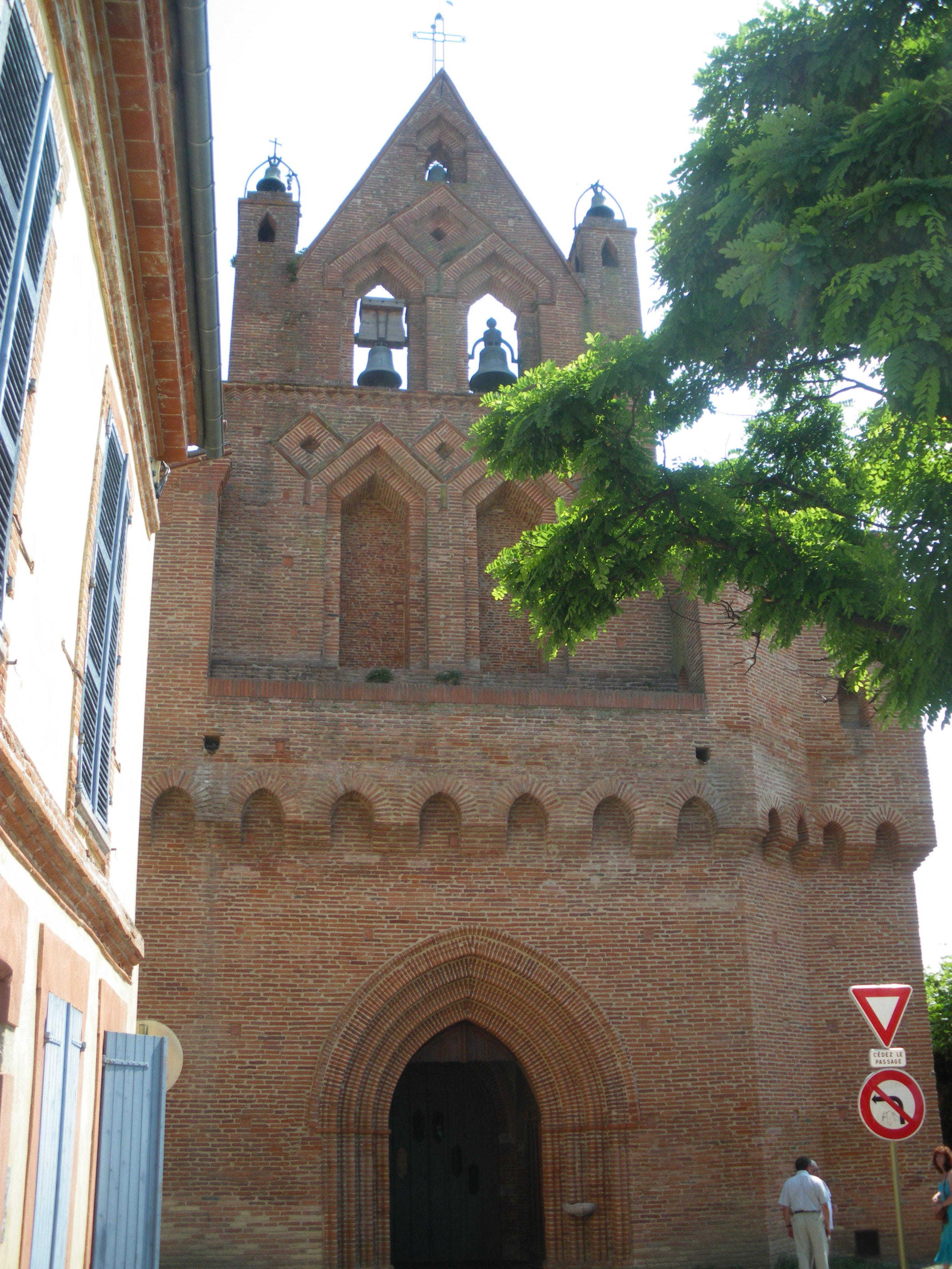 Église de Plaisance-du-Touch (Haute-Garonne, France).